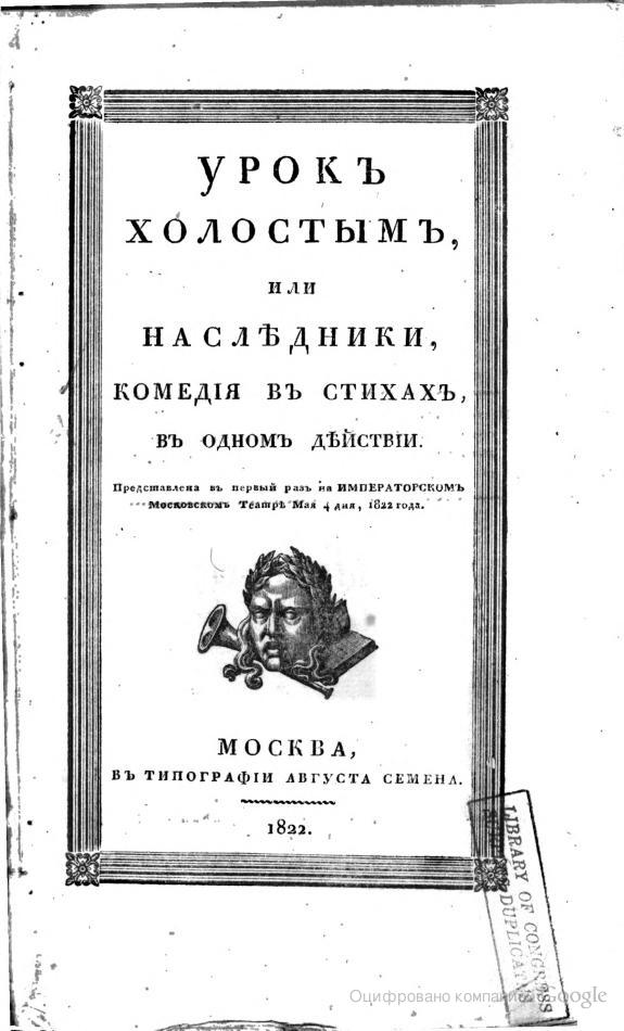 Обложка пьесы в стихах М. Н. Загоскина "Урок холостым, или наследники"